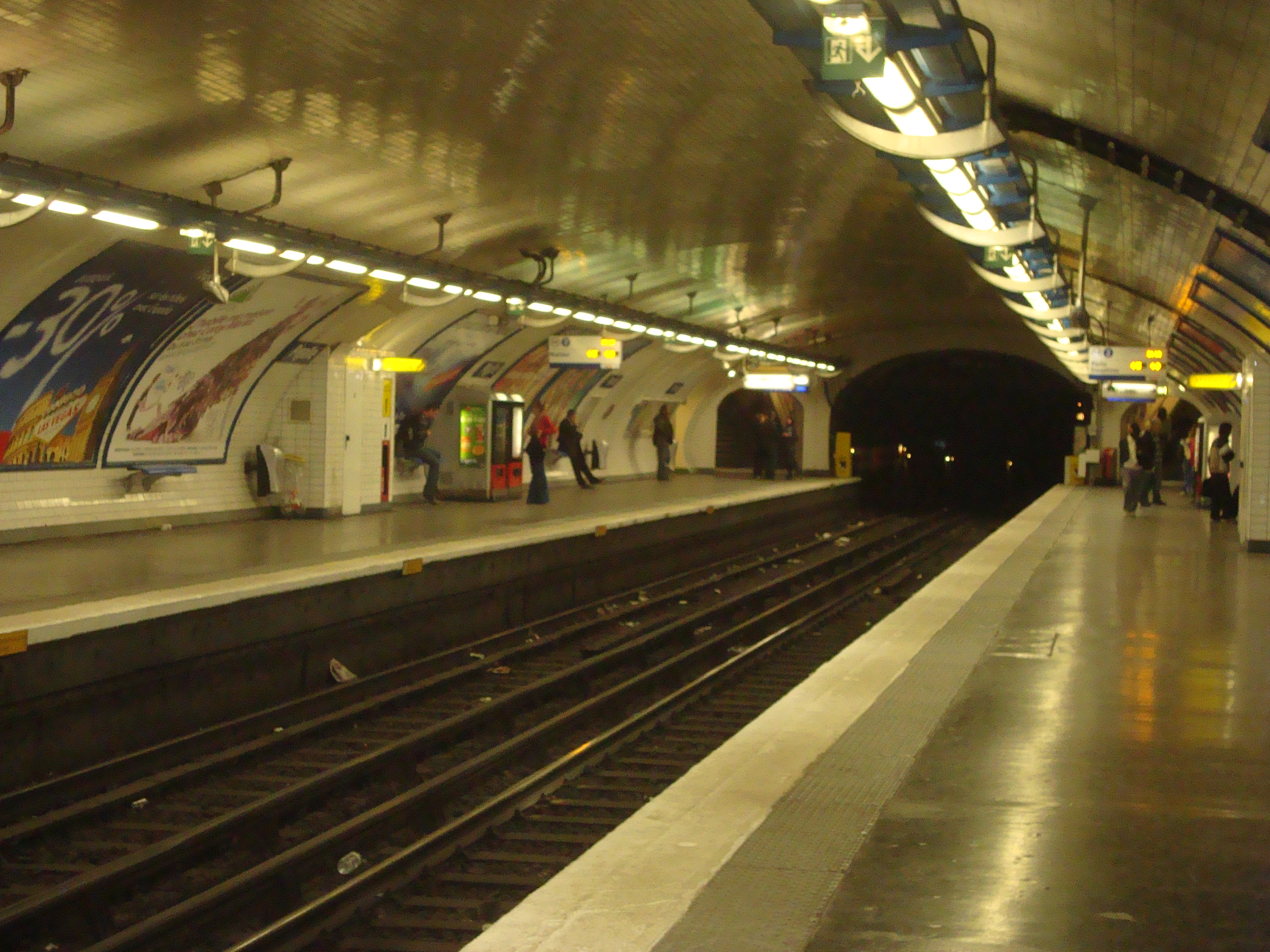 Quai de la station Pigalle sur la ligne 2.